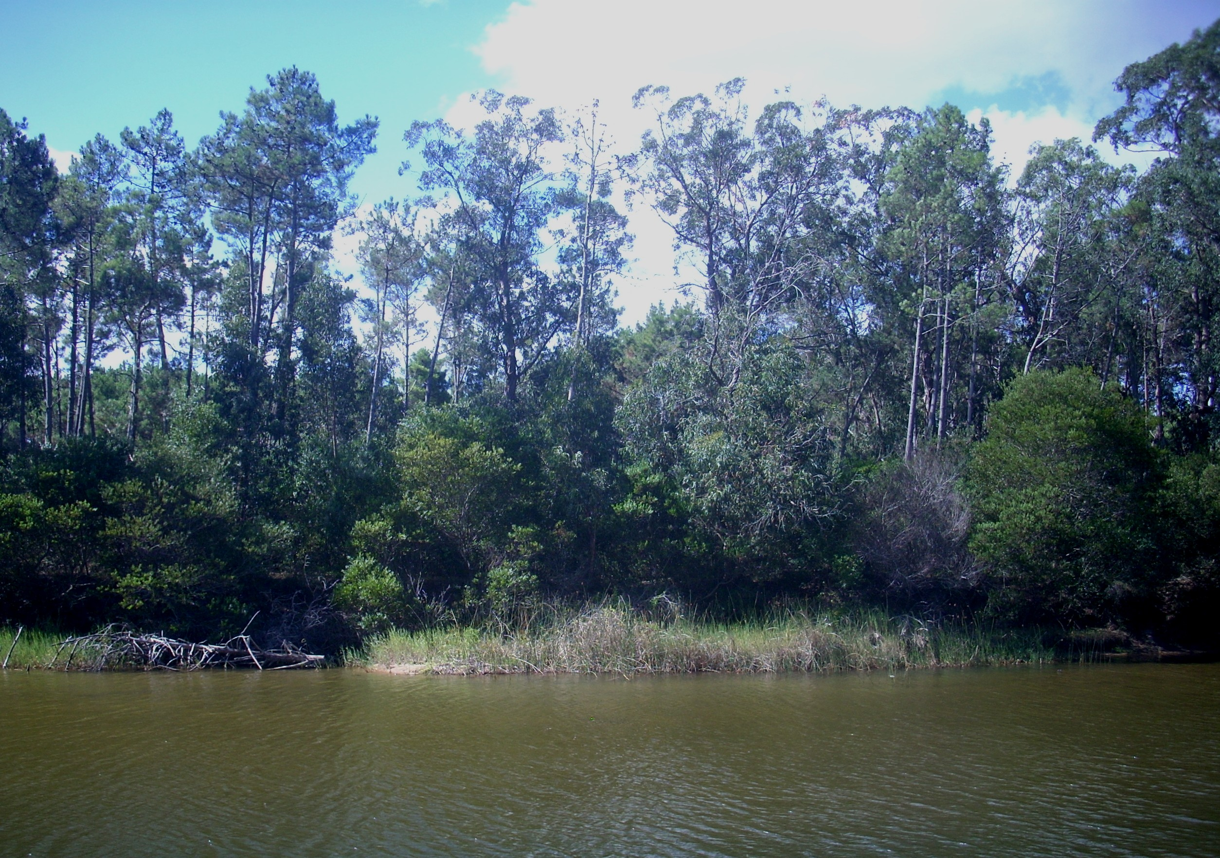 Chihuahua, Maldonado, Uruguay